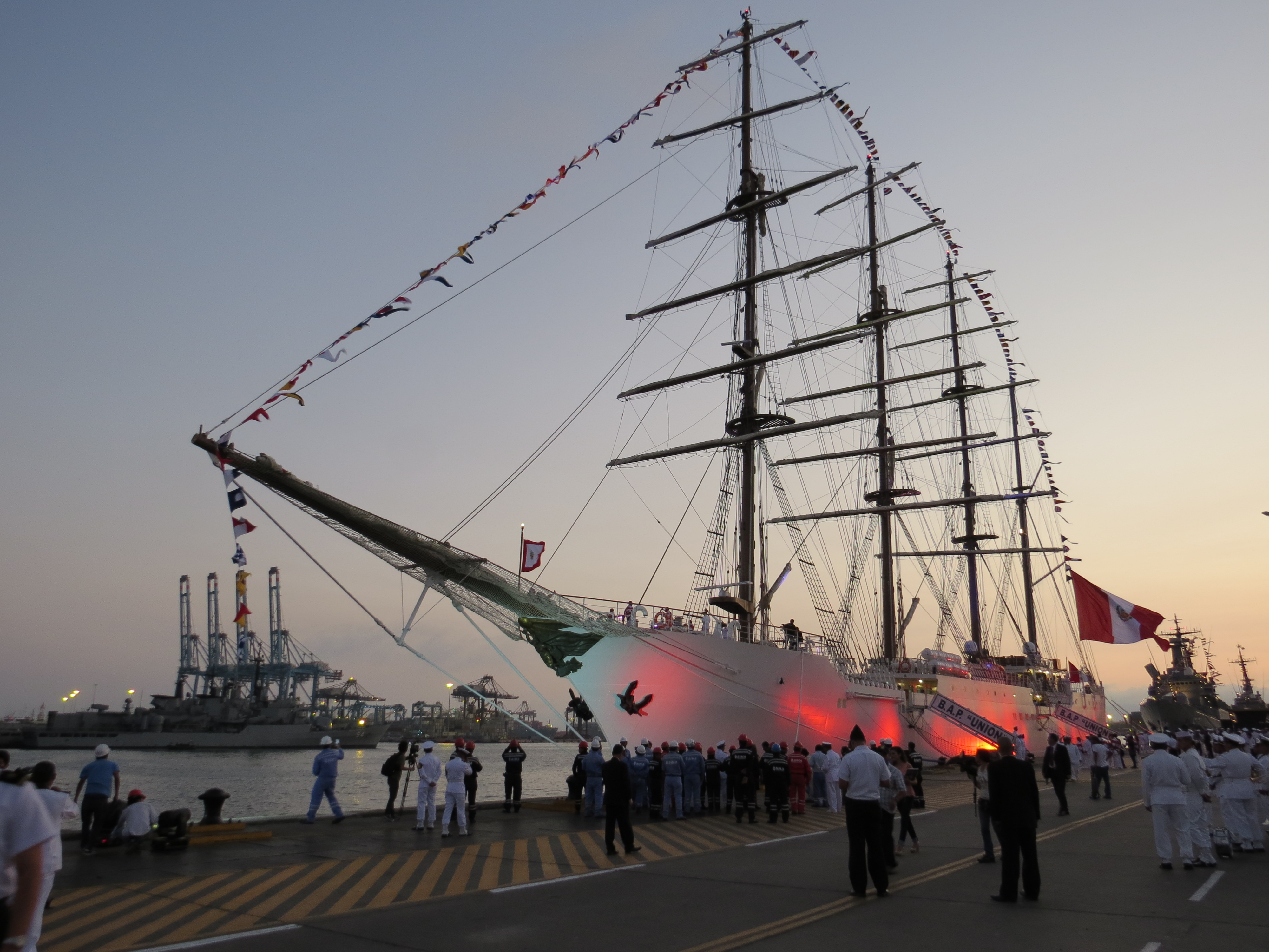 BAP Unión en Base Naval del Callao (luego de la ceremonia de incorporación a servicio)